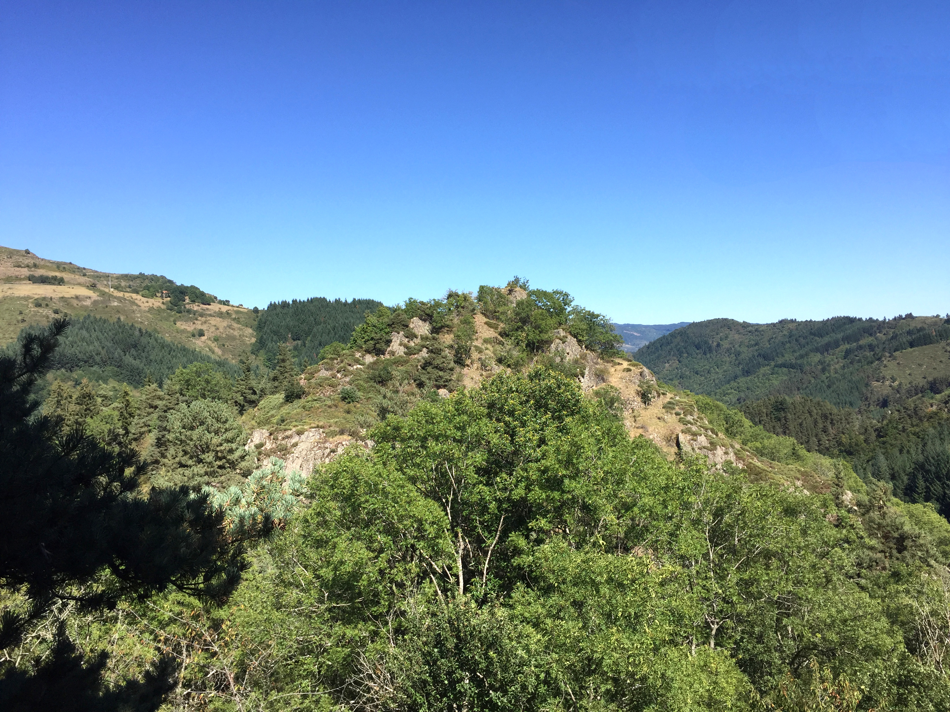 Photo de la colline de Chambarlhac, sur laquelle fut construit un château féodal, cité pour la première fois en 1014, et qui donna son nom à la Seigneurie de Chambarlhac et à la famille noble qui porta ce nom. Commune de Chanéac, Ardèche, France. Août 2017